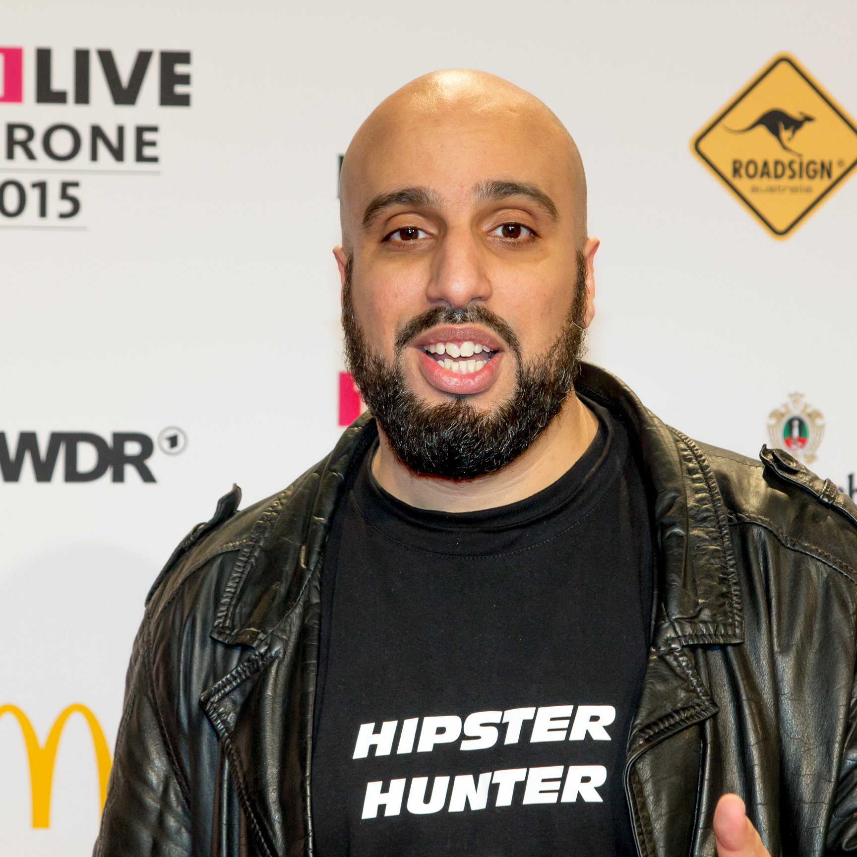 1LIVE Krone 2015 - Abdelkarim